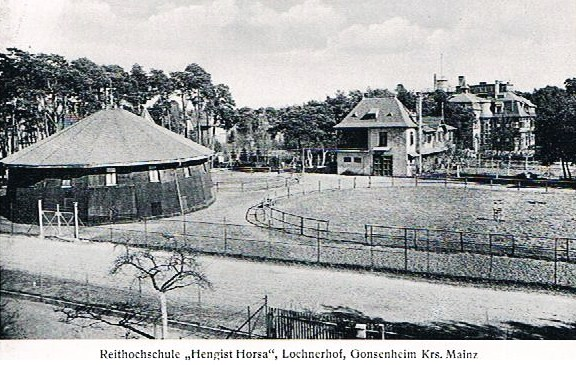 Scan eines alten Familienfotos